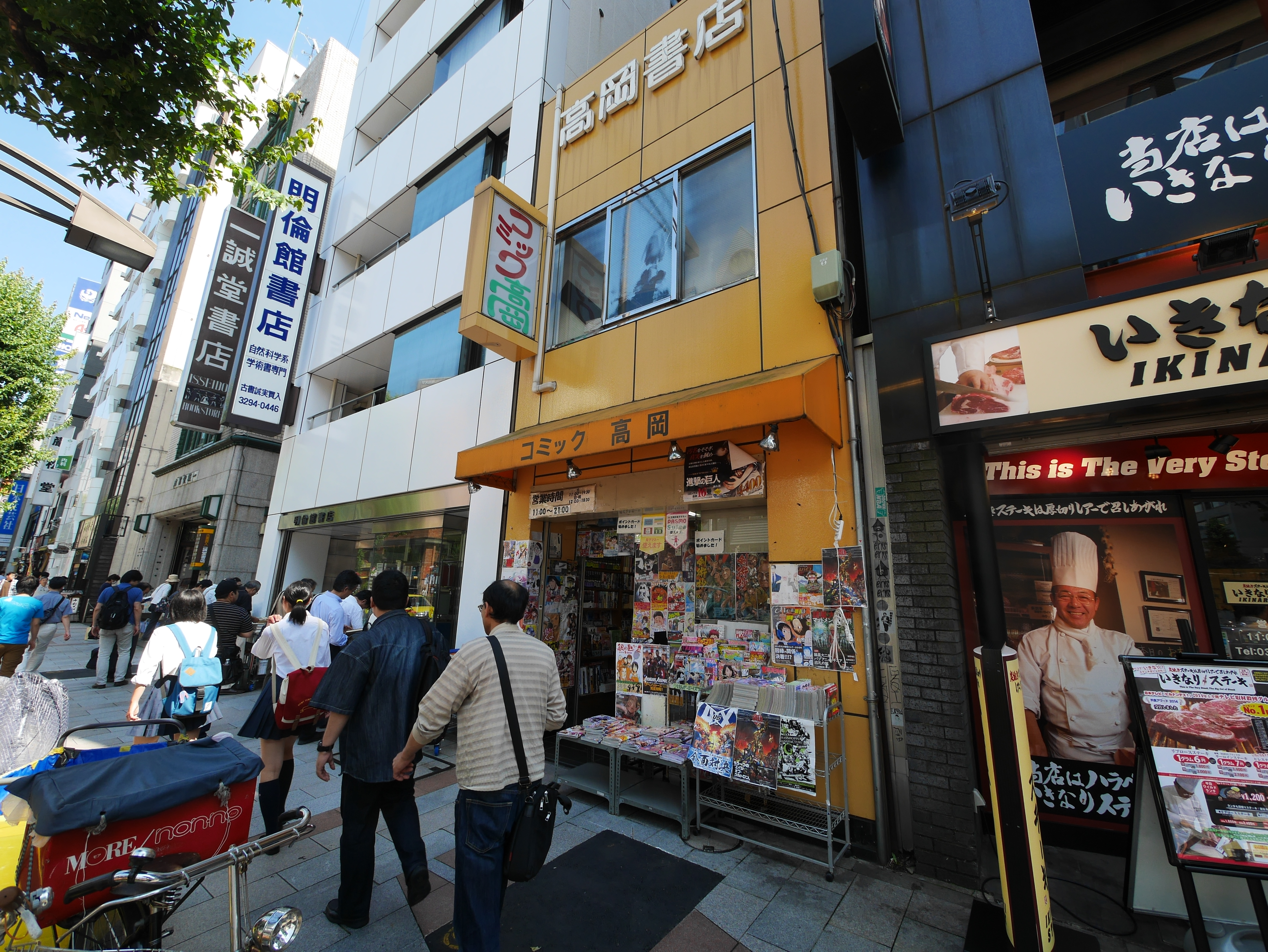 高岡書店神保町店